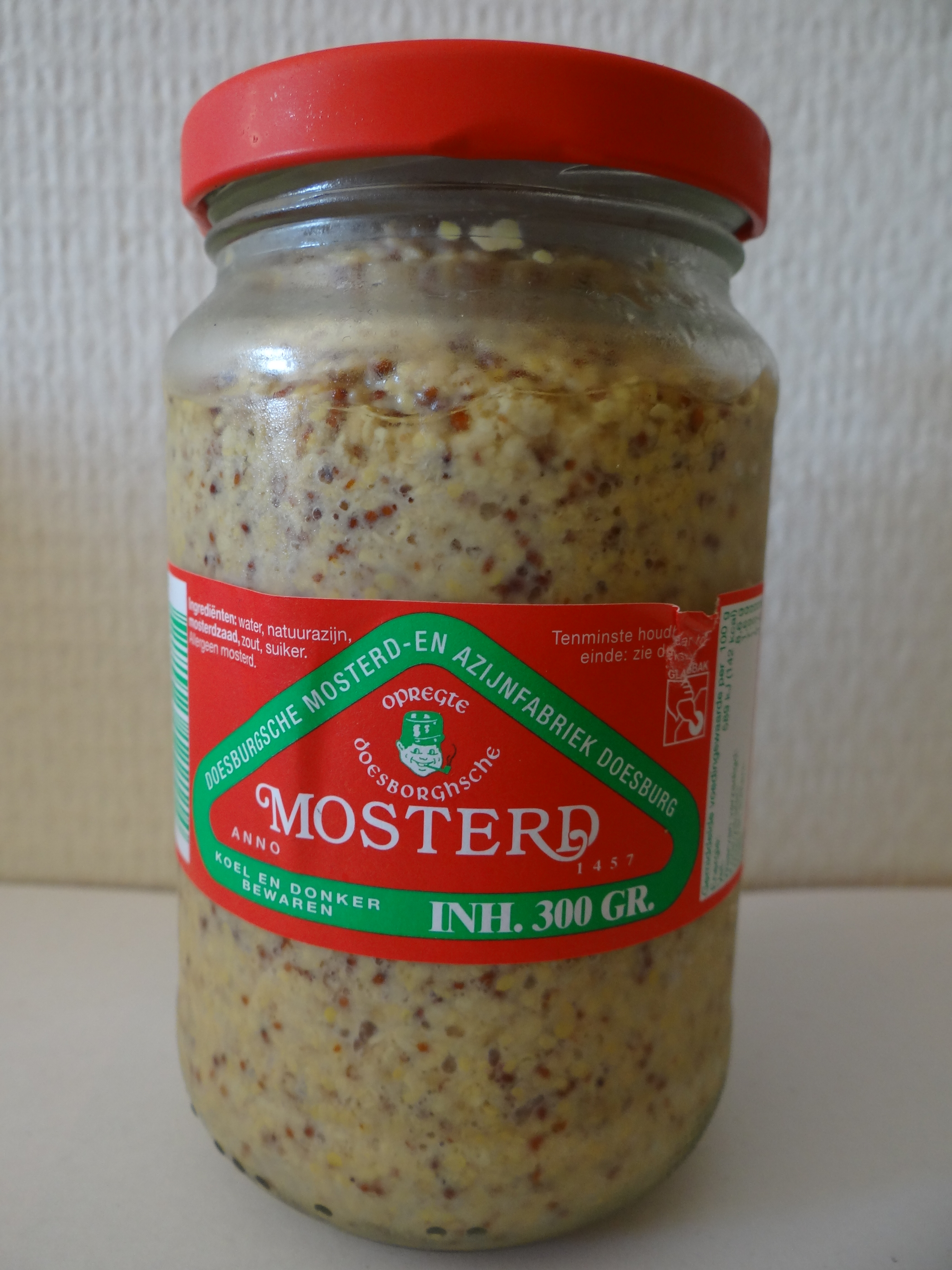 Doesburgsche mosterd